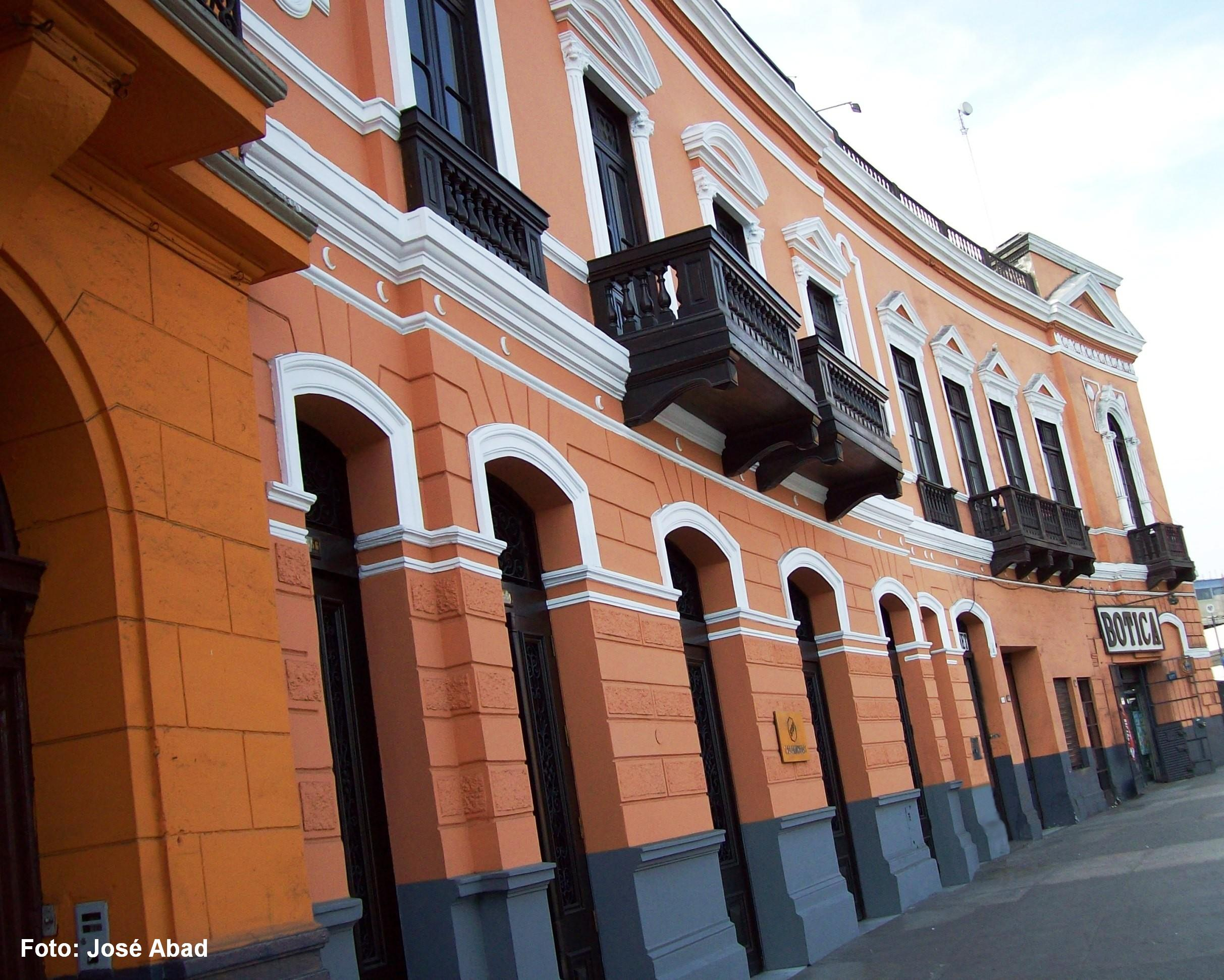 Vista desde la intersección de la Avenida Arica con la Plaza Bolognesi.